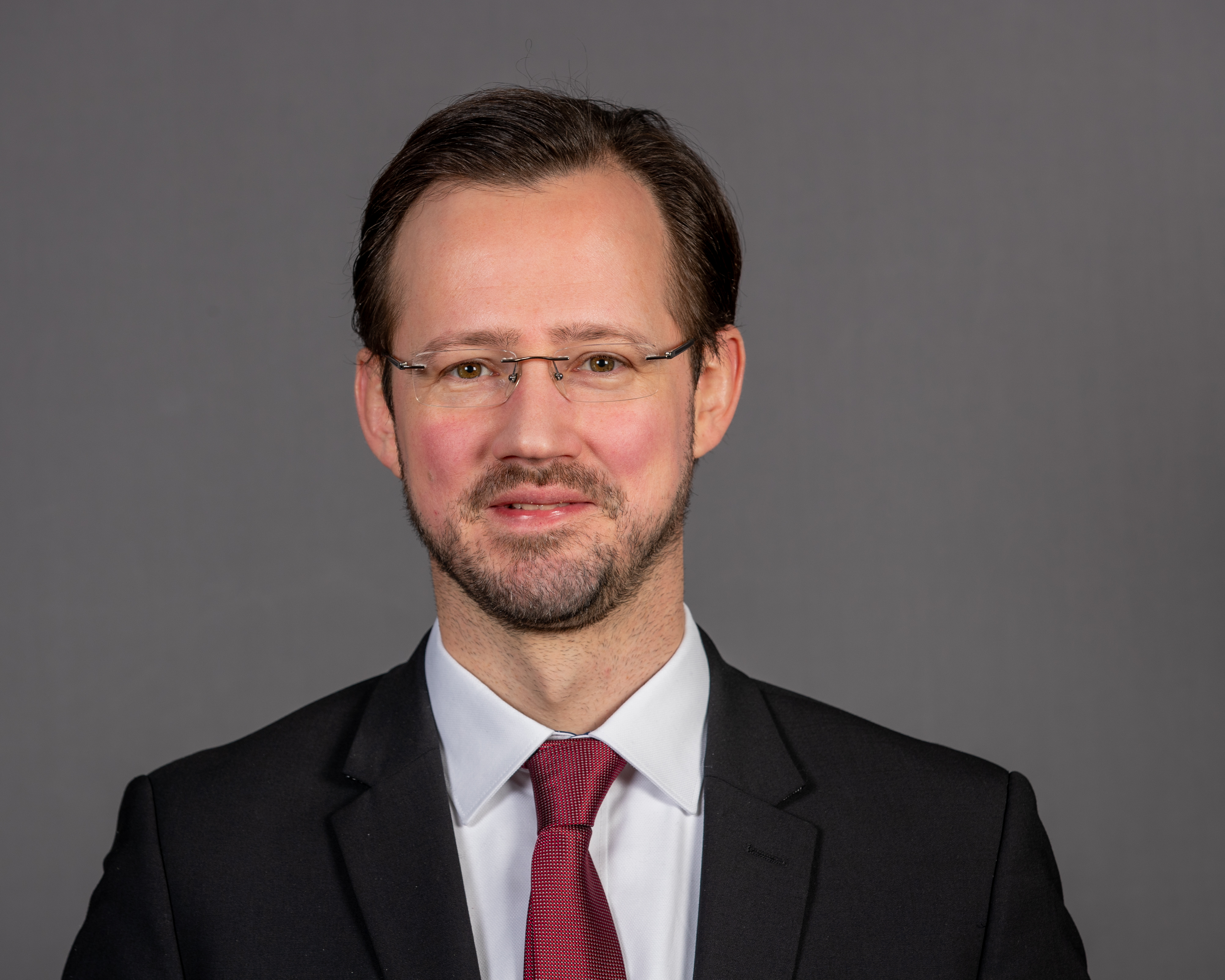 Dirk Wiese (SPD) beim Bundestagsprojekt 2020